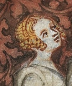 Bona Lucemburská